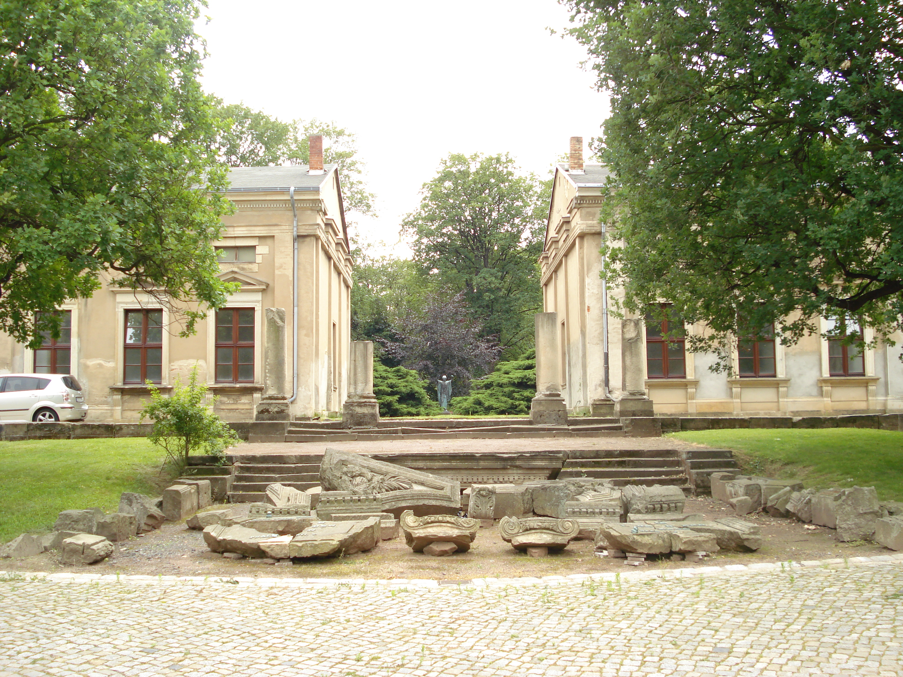 The Neuer Annenfriedhof of Dresden.